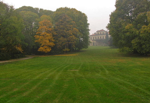 Parco di Arcore